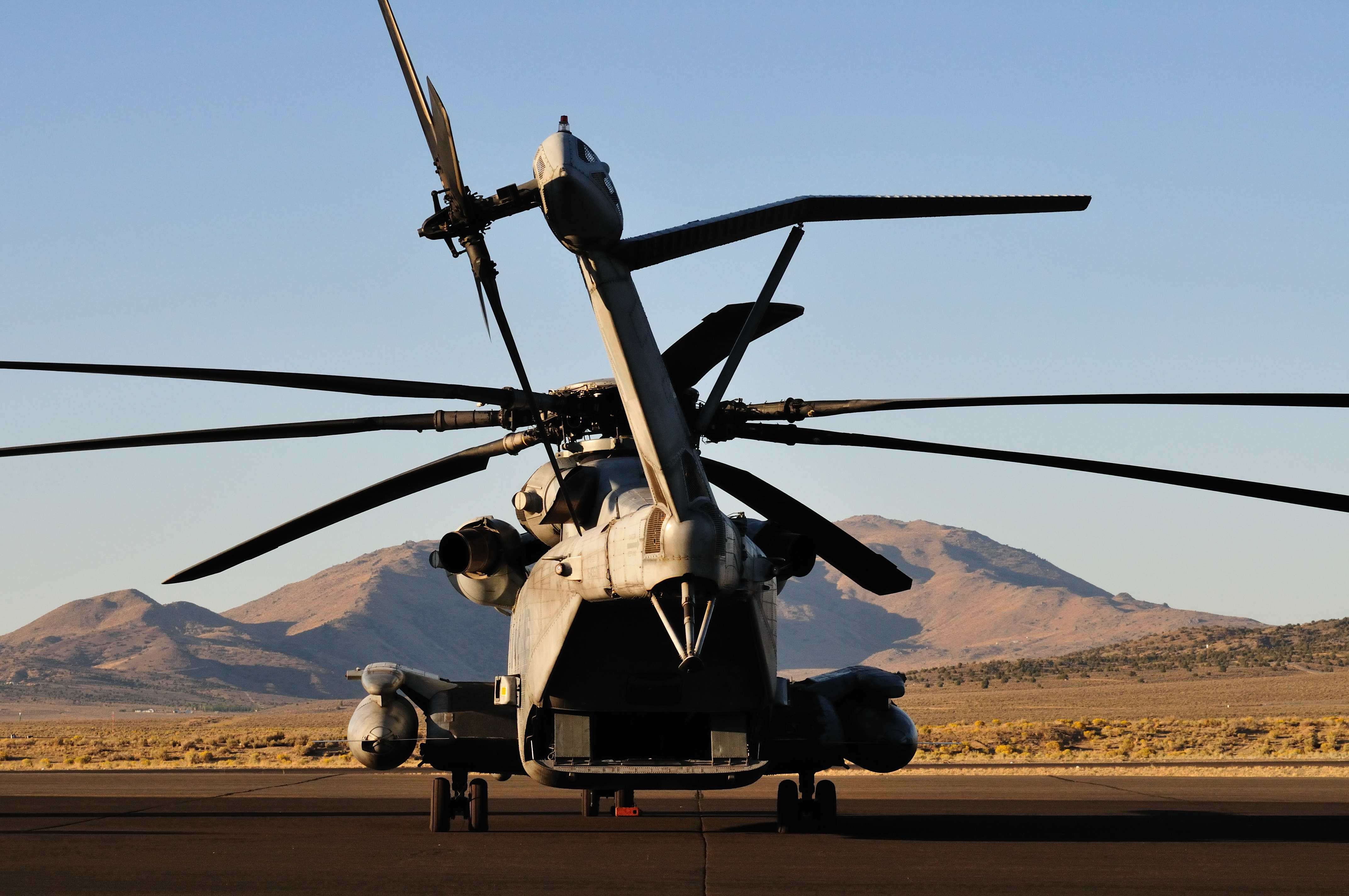 Reno Air Races 2009